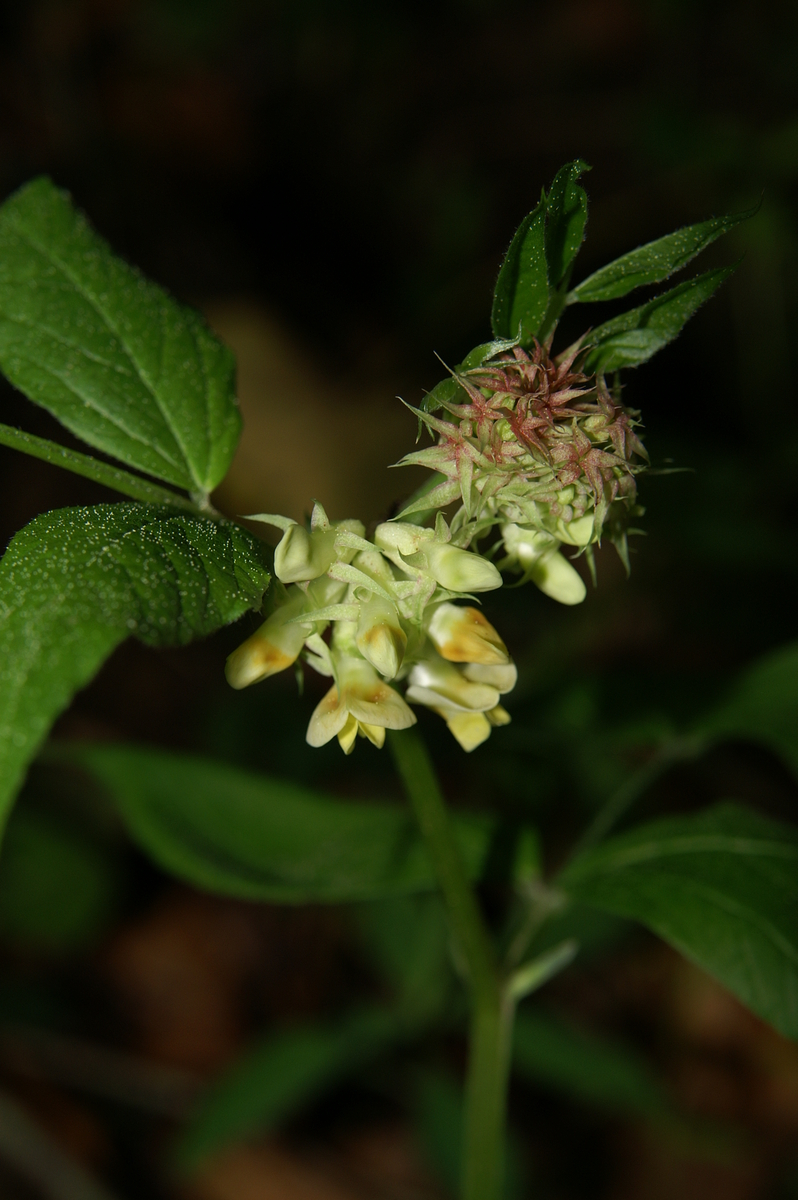 Širokolistna grašica v Želimljah.